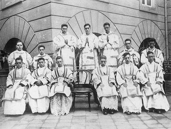 Ordenación sacerdotal de Óscar Arnulfo Romero (Roma, 4 de abril de 1942).